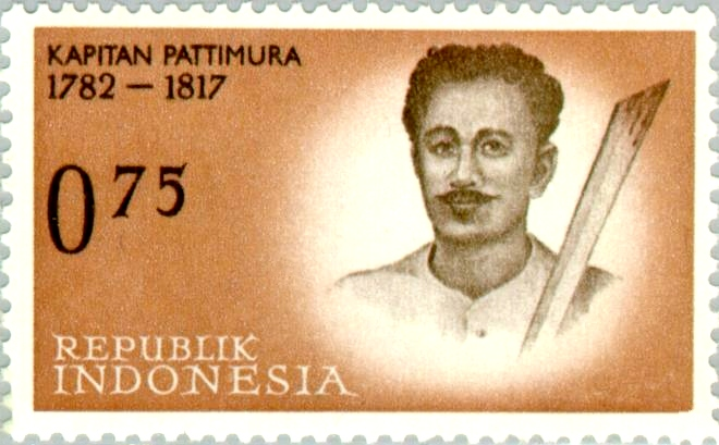 Pattimura